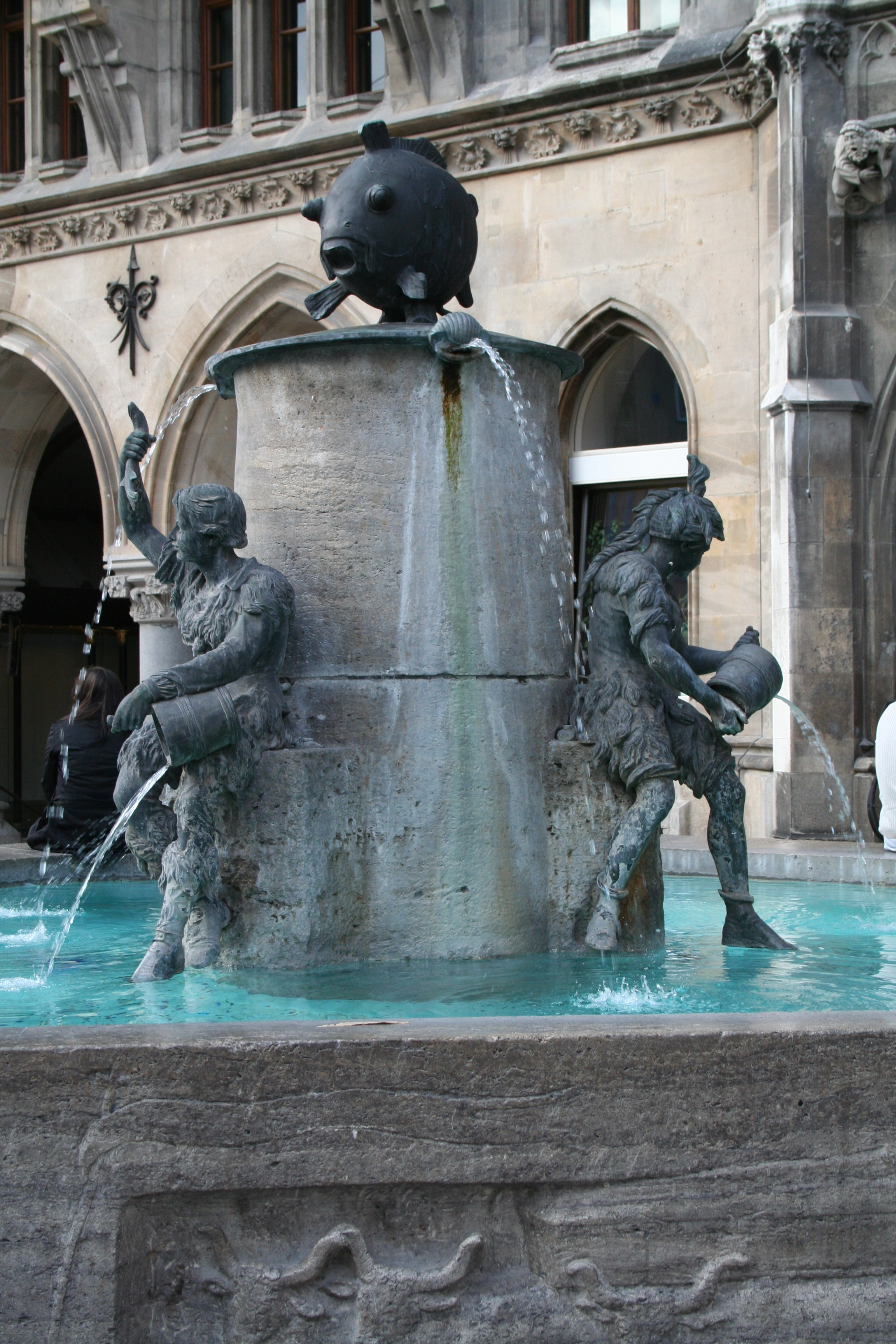 Zwei Metzgergesellen leeren ihre Wassereimer in den Brunnen.